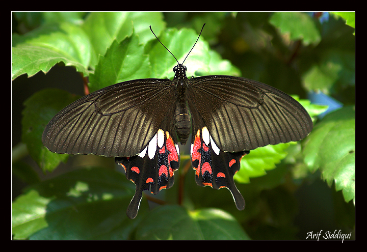 Papilio polytes basking.